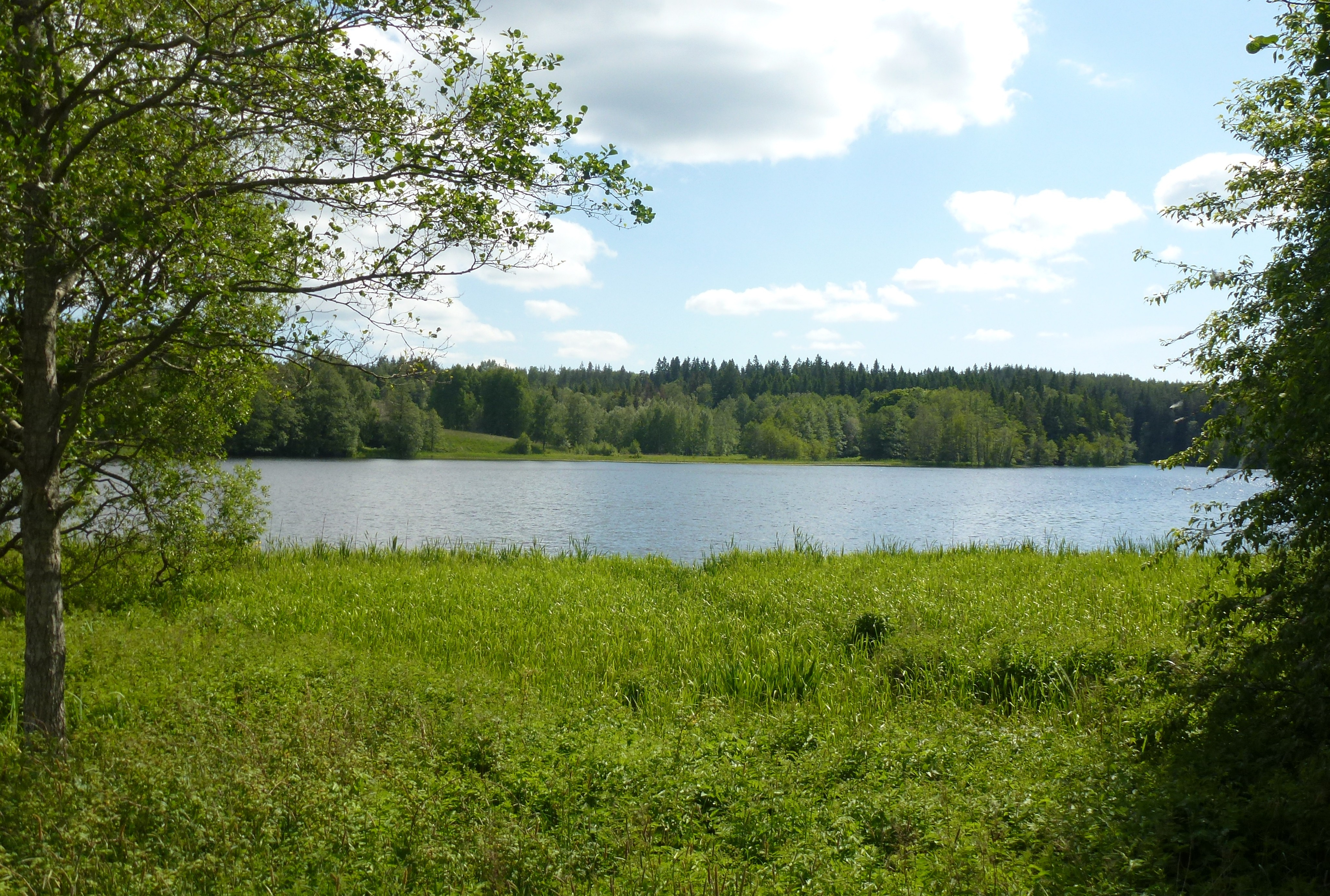 Bysjön Botkyrka kommun